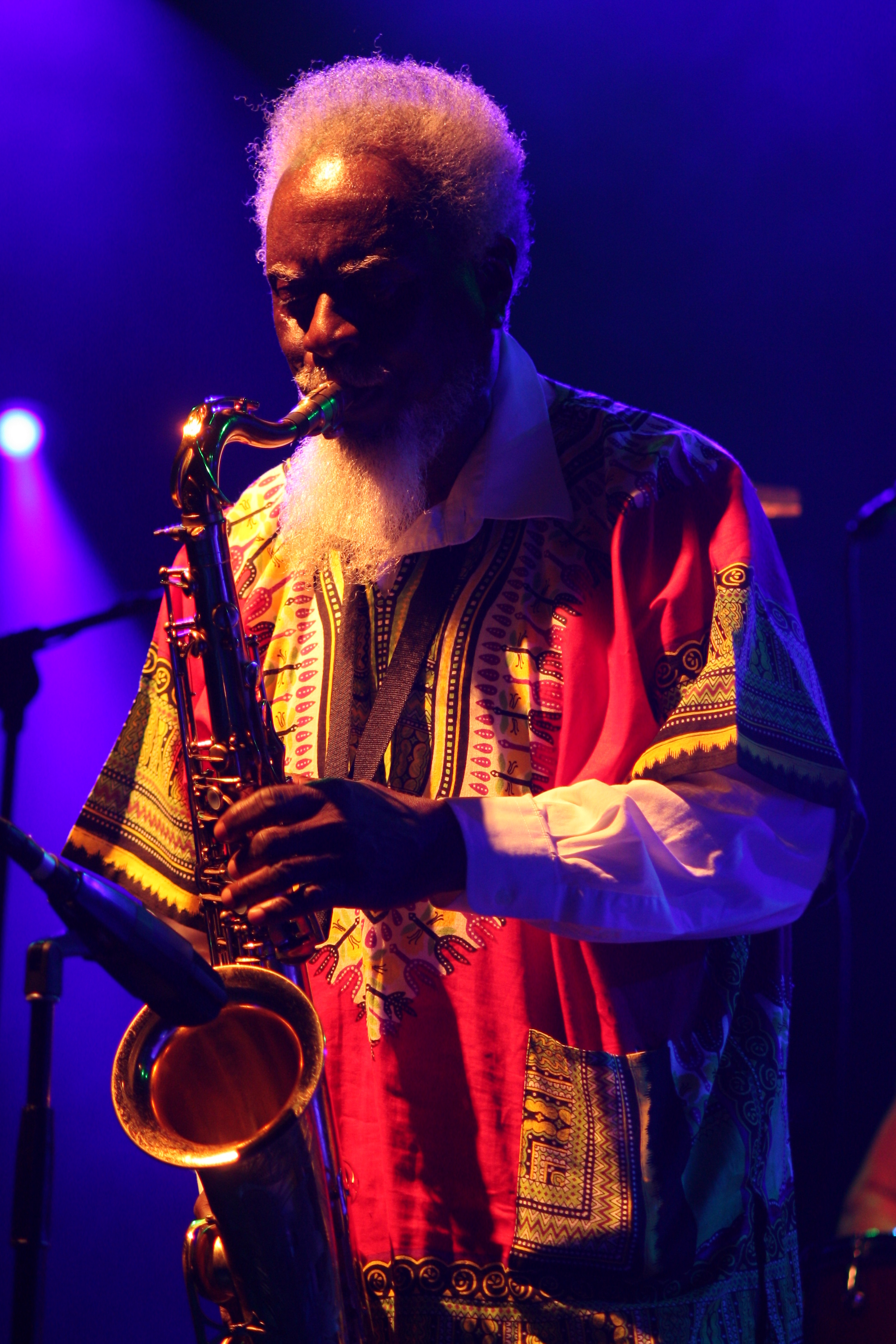 44. Deutsches Jazzfestival Frankfurt 2013: Pharoah Sanders